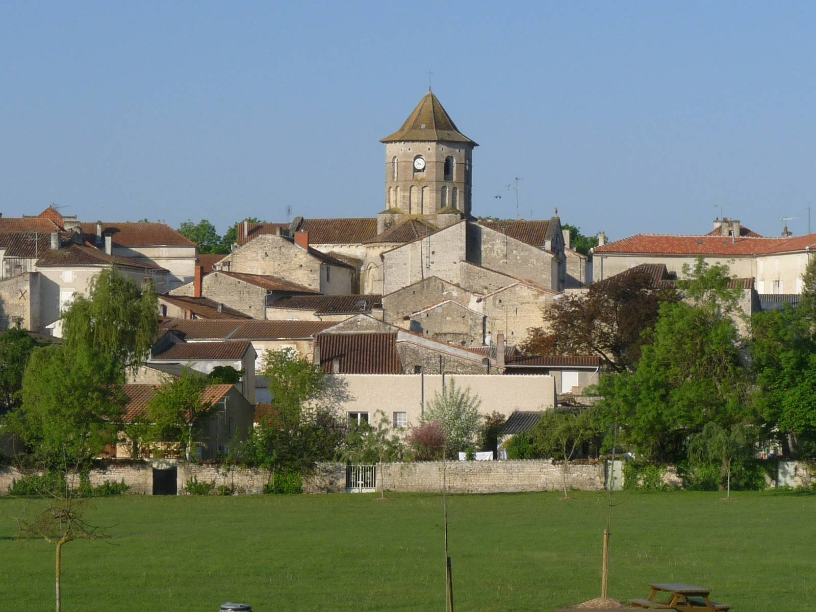 Vue de la ville et de l'église de Rouillac, Charente, France